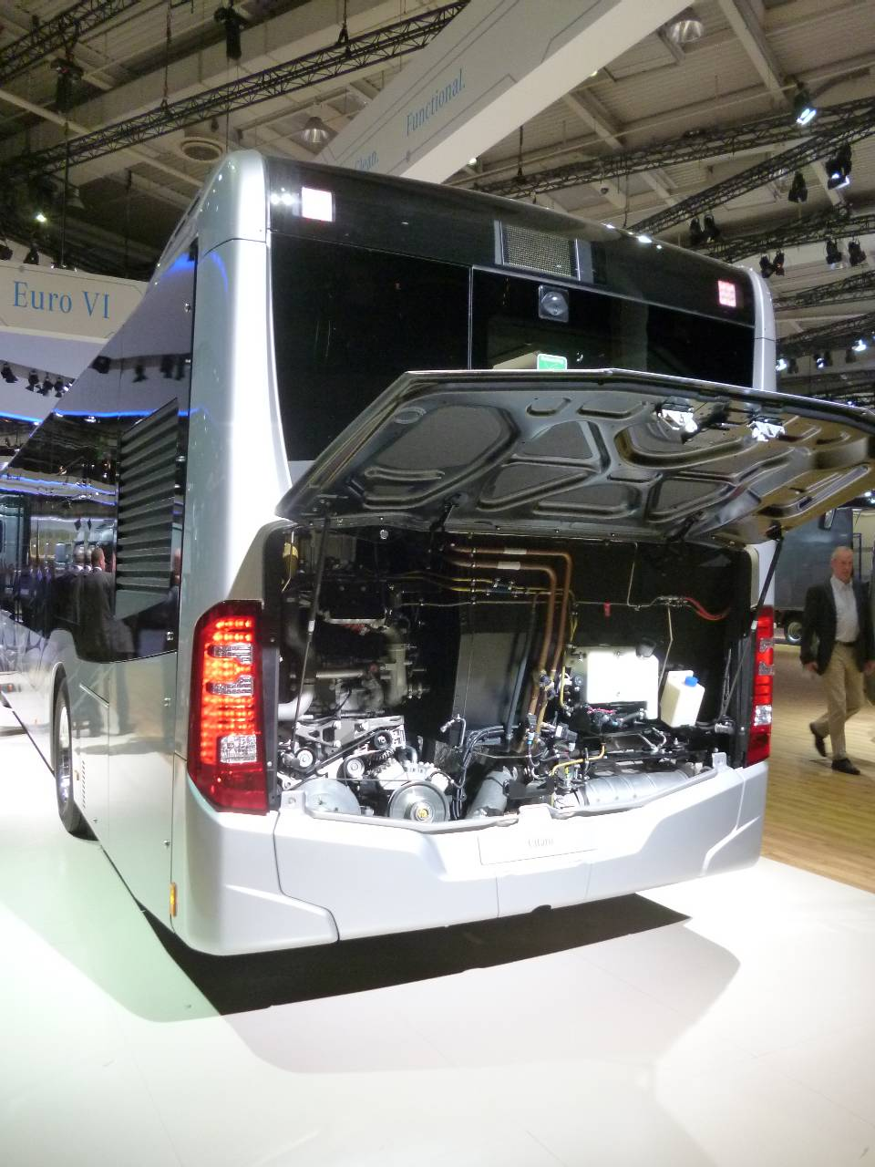 Motorraum eines MB Citaro C2 mit Turmmotor